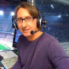 Auriemma nel 2010